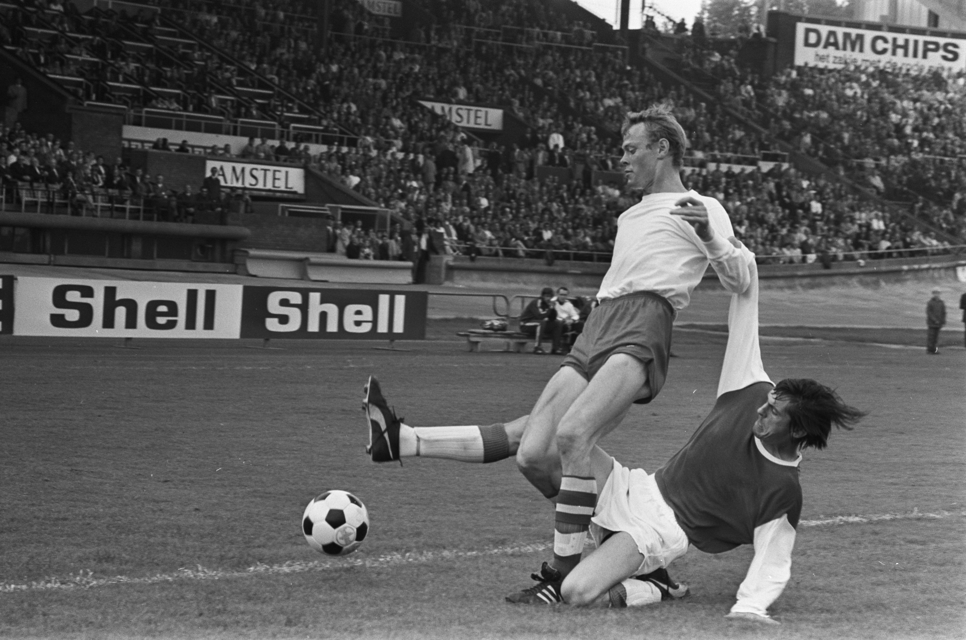 Collectie / Archief : Fotocollectie Anefo Reportage / Serie : [ onbekend ] Beschrijving : DWS tegen PSV 0-1; Deijkers (rechts) bijna op de grond, links Jensen Datum : 23 augustus 1970 Trefwoorden : sport, voetbal Persoonsnaam : Jensen Instellingsnaam : PSV Fotograaf : Evers, Joost / Anefo Auteursrechthebbende : Nationaal Archief Materiaalsoort : Negatief (zwart/wit) Nummer archiefinventaris : bekijk toegang 2.24.01.05 Bestanddeelnummer : 923-7719